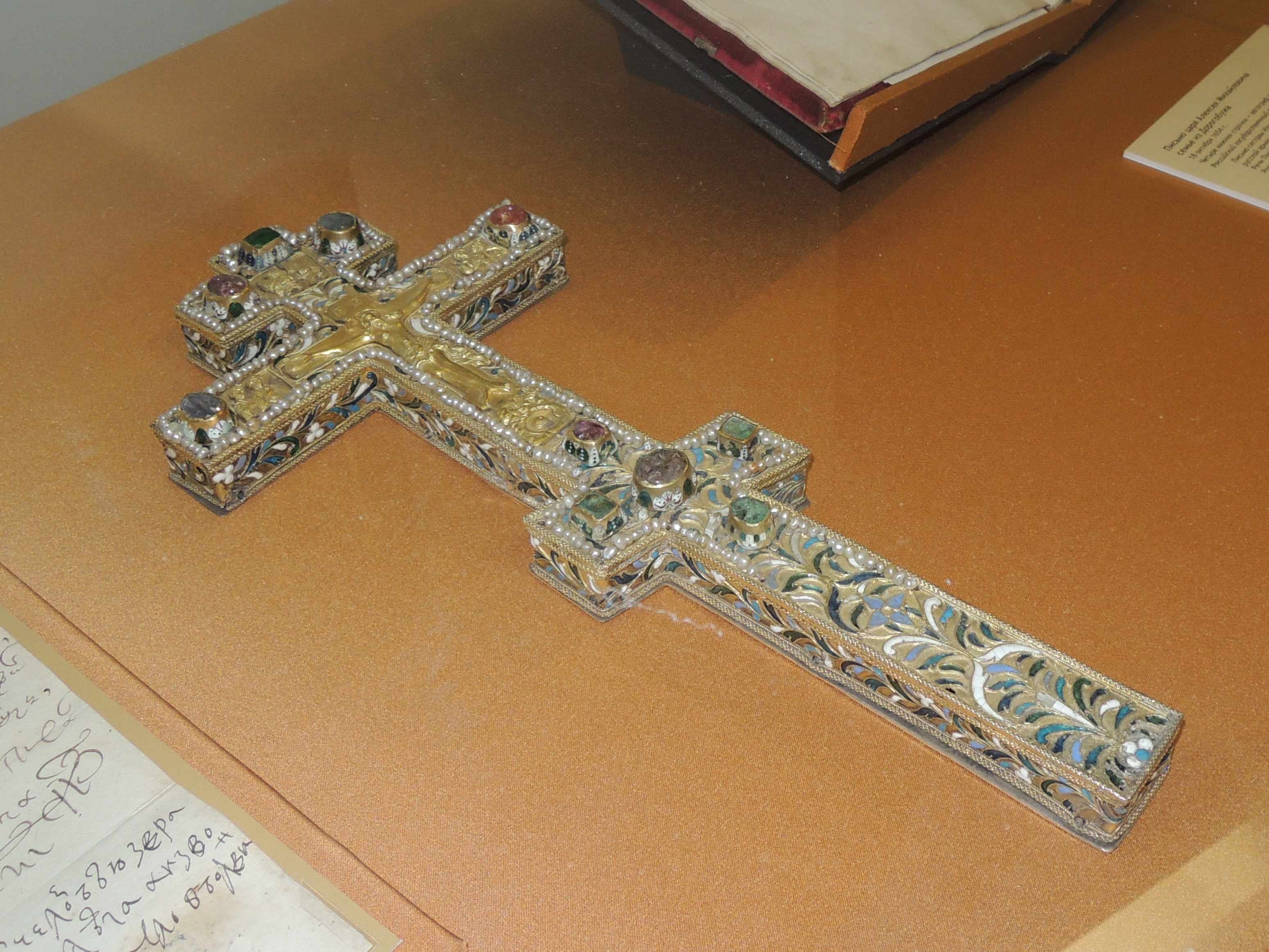 Крест напрестольный. Москва. Мастерские Кремля. 1652. Золото, серебро, эмаль, драгоценные камни. ГИМ. Вклад царя Алексея Михайловича и Марии Милославской в церковь Рождества Богородицы на сенях в Кремле.